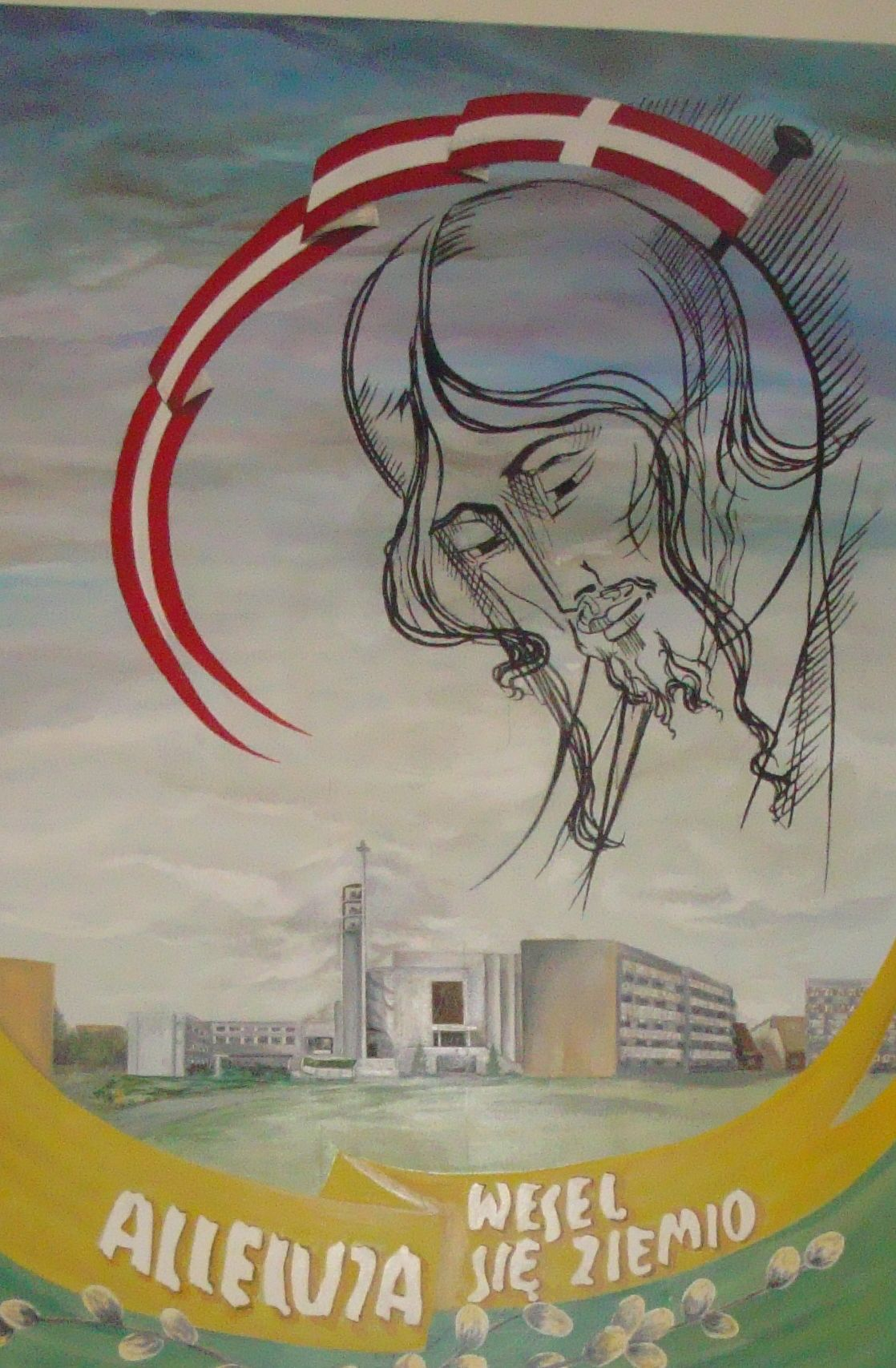 Kościół Matki Bożej Nieustającej Pomocy w Tarnobrzegu-Serbinowie